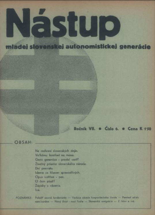 Titulný list dvojtýždenníka Nástup.